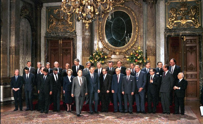 29-30.6.87 Tagung des Europäischen Rates unter Vorsitz des belgischen Ministerpräsidenten Wilfried Martens mit Bundeskanzler Kohl und Bundesminister im Auswärtigen Amt Hans-Dietrich Genscher in Brüssel. 29.6.1987 Familienfoto der (Cai Ellrich)Regierungschefs und der Aussenminister anläßlich eines Mittagsessens, gegeben von König Baudouin, im Königspalast.